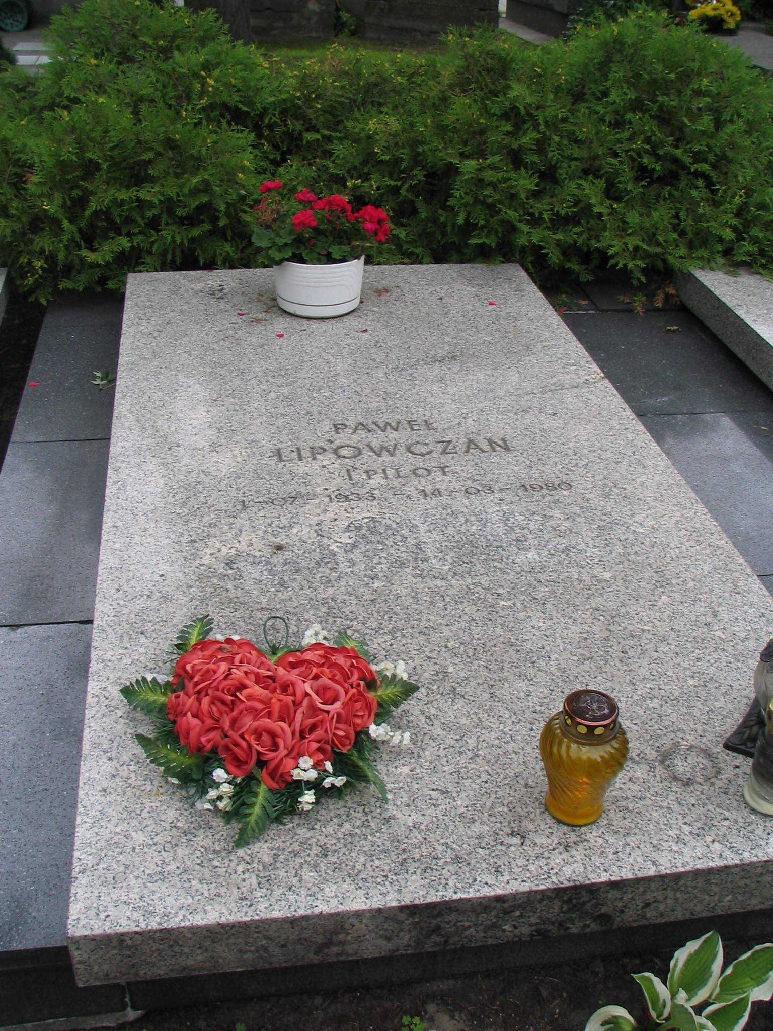 Grób pilota Pawła Lipowczana